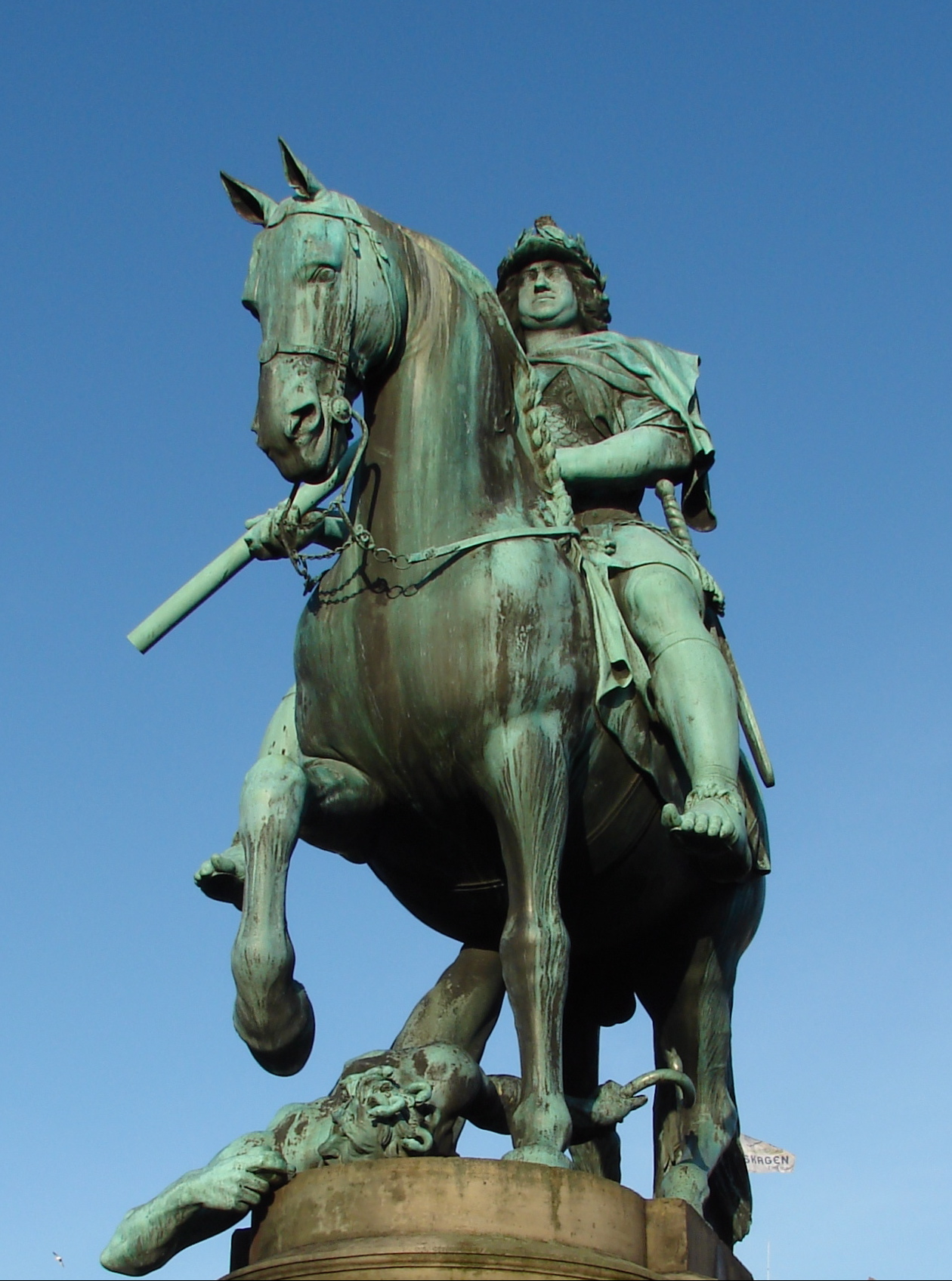 Detalje fra Abraham César Lamoureux' (- 1692) skulpturgruppe af kong Christian V, Kongens Nytorv, København